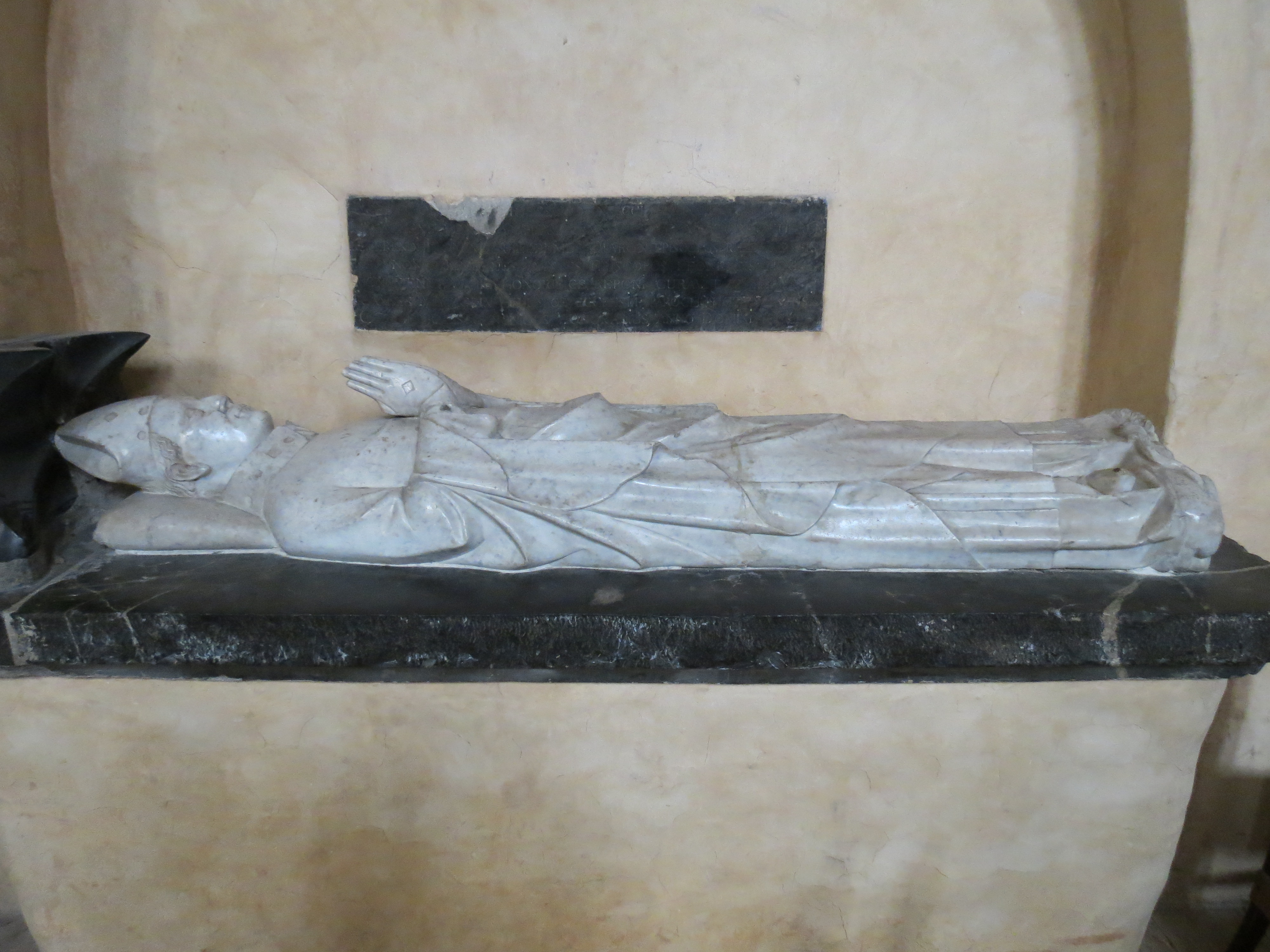 Gisant de Guillaume Ouvroin, évêque de Rennes, en la cathédrale de la Sainte-Trinité de Laval, Mayenne, Pays de la Loire.